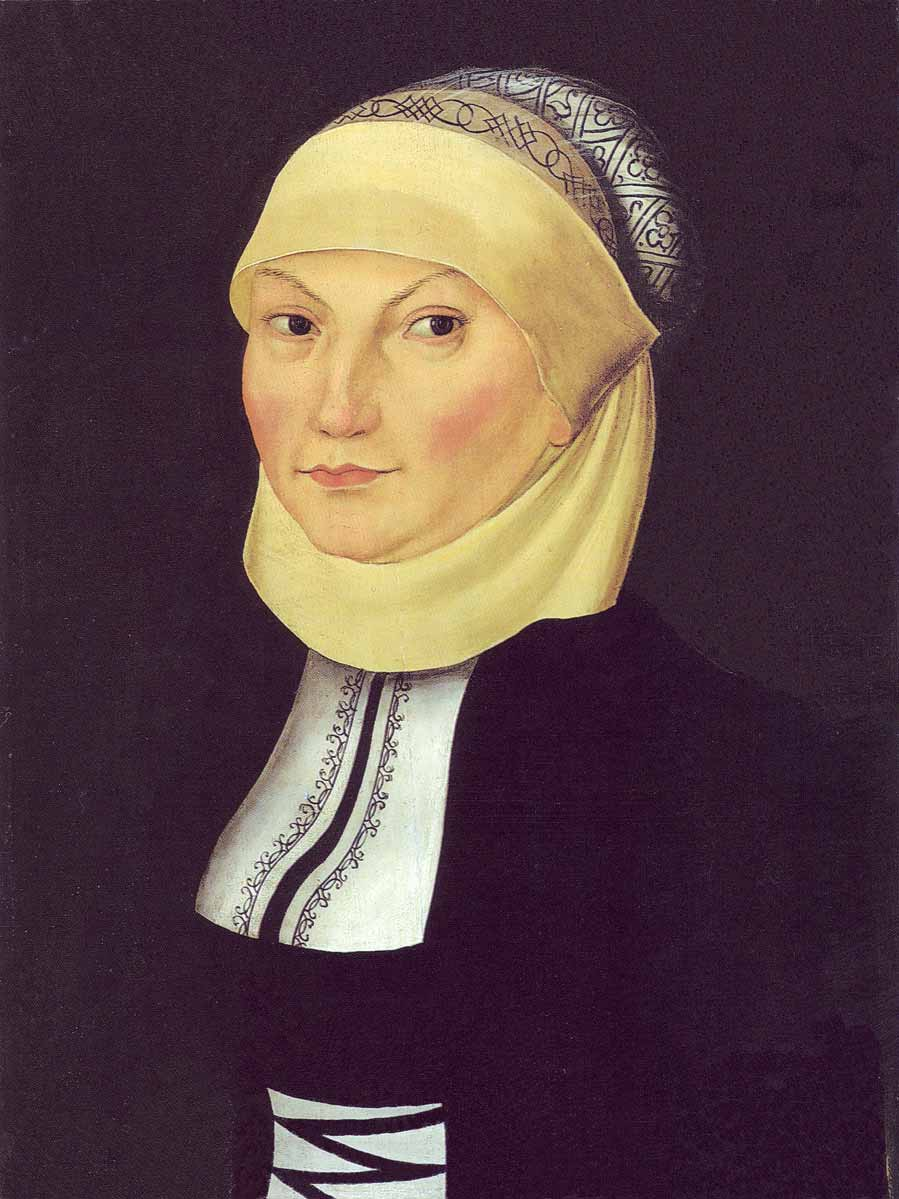 Gemälde Katharina von Bora /Öl auf Buchenholz